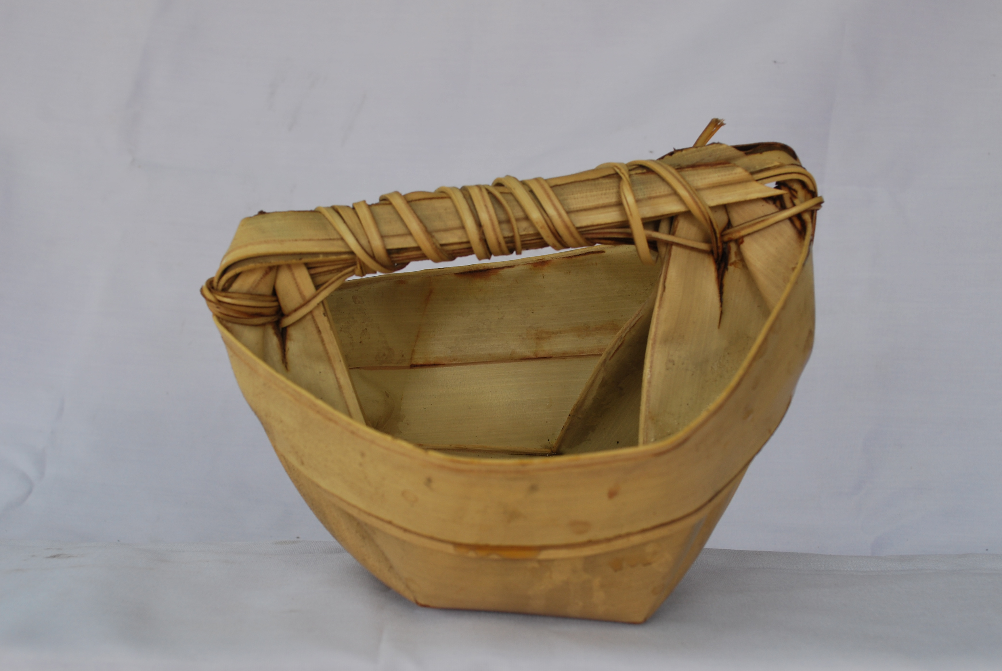 Traditioneller Wasserbehälter aus Palmblättern aus Camenaça/Osttimor